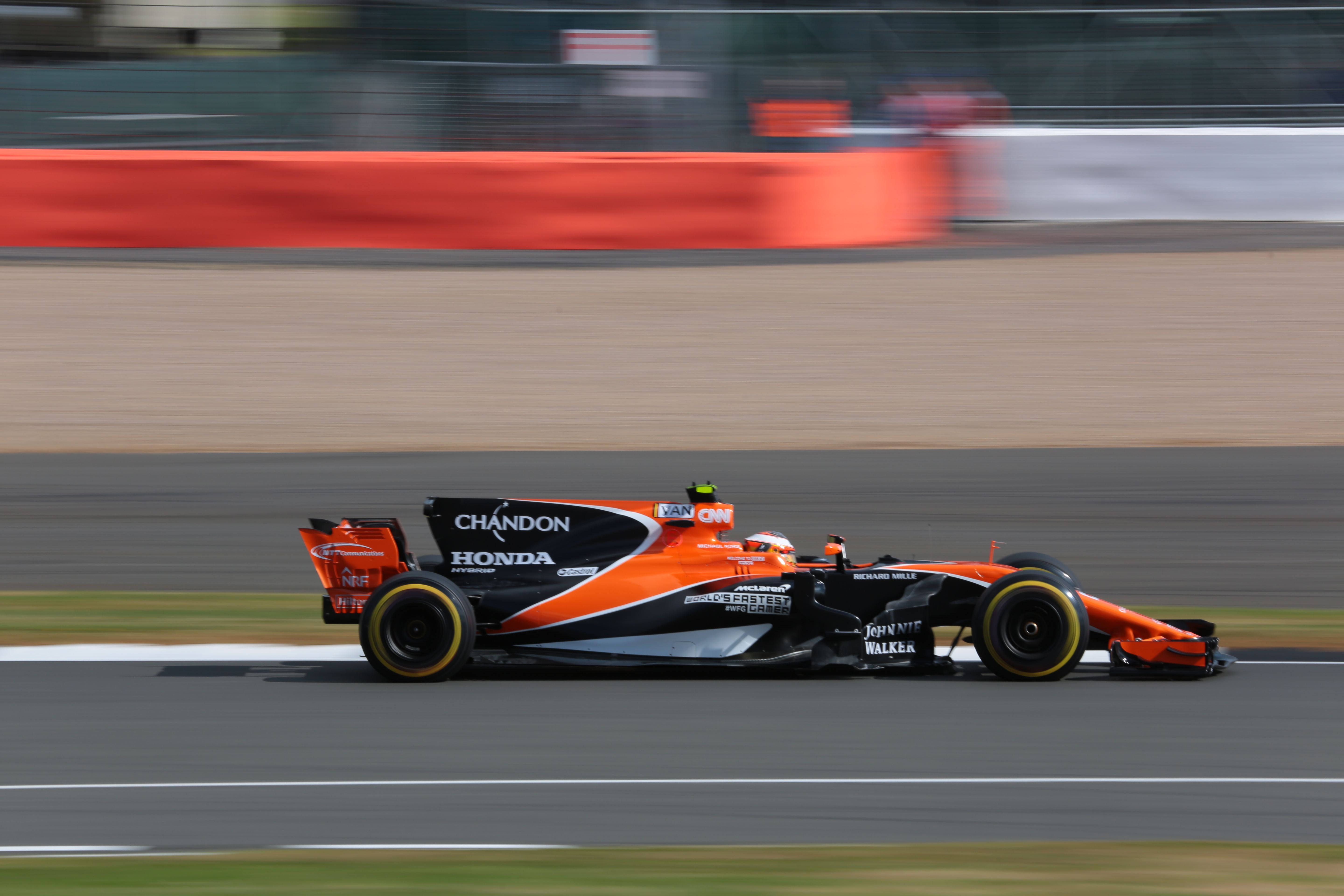 f1